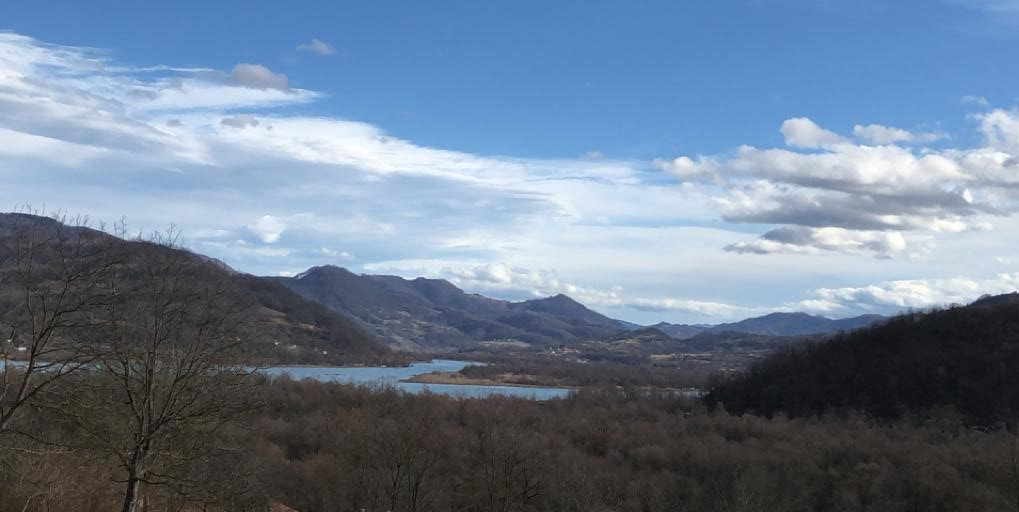 Поглед на реку Дрину из места Дрињача